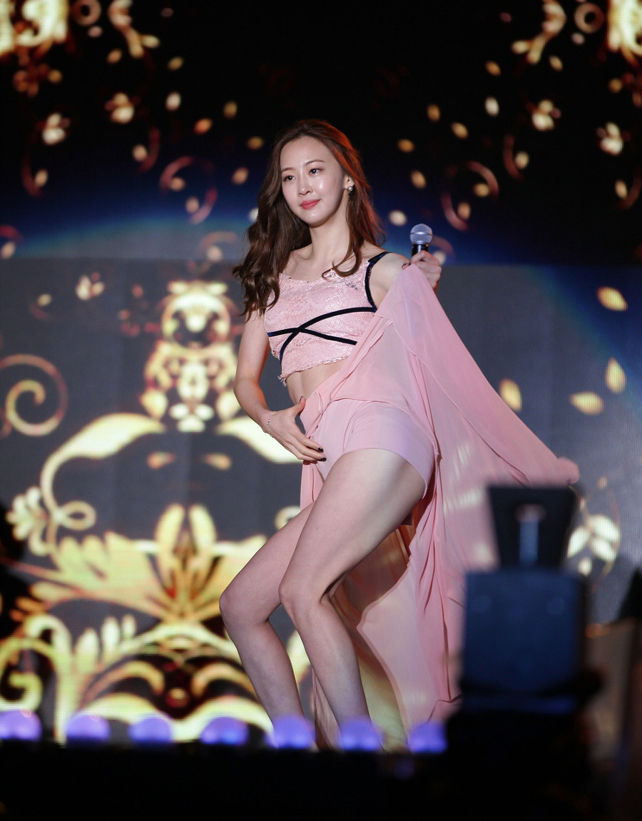 씨스타(SISTAR) G페스티벌 아시아 드림 콘서트